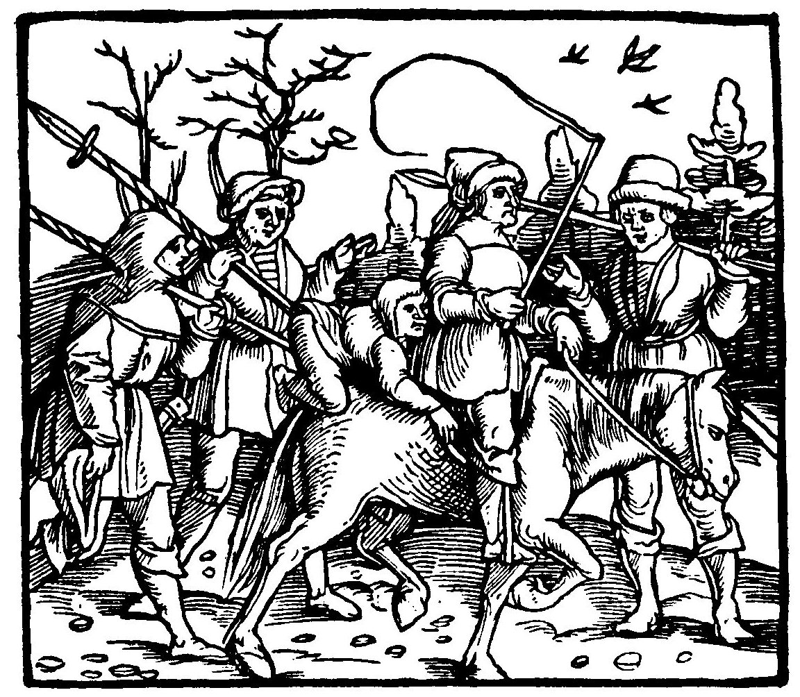 Ein kurtzweilig lesen von Dyl Vlenspiegel gebore vß dem land zu Brunßwick : wie er sein Leben vollbracht hatt ; XCVI seiner Geschichten